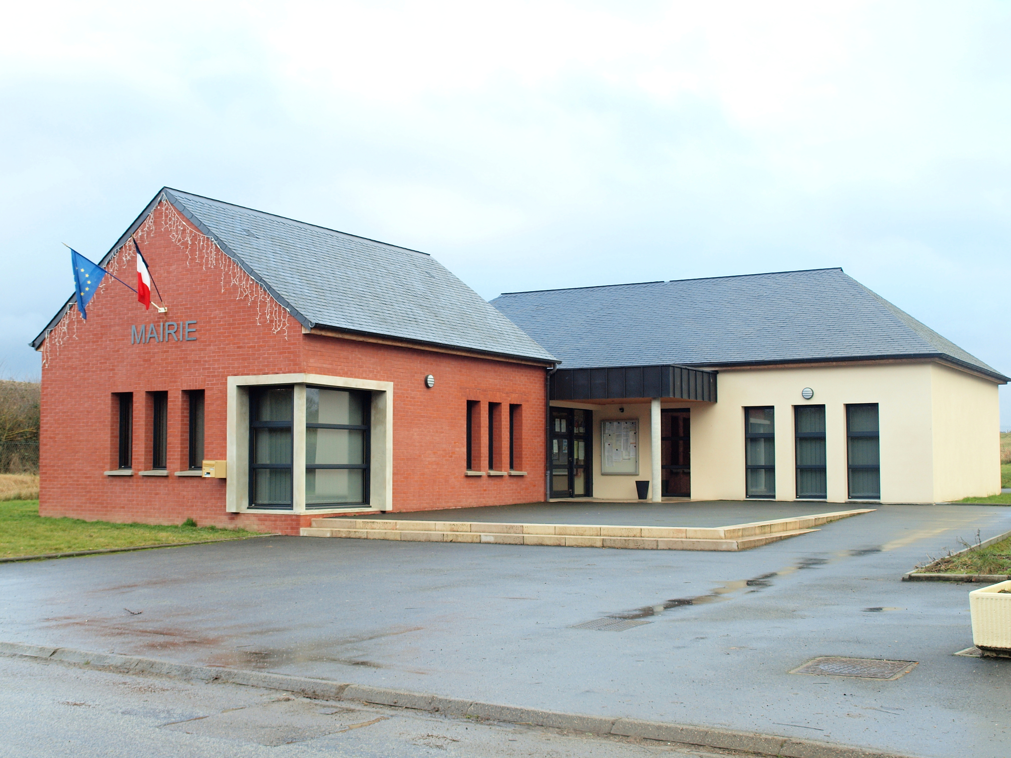 Haussez (Seine-Maritime, France)